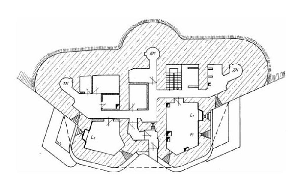 MO S-19 „Aleo“ – bazplano de la supra etaĝo de la infanteria fuorto en la III-a rezistkapabla grado. mezuris kaj desegnis: Petr Tomašovský Kategorio:Bildoj de ĉeĥoslovakaj fortikaĵoj